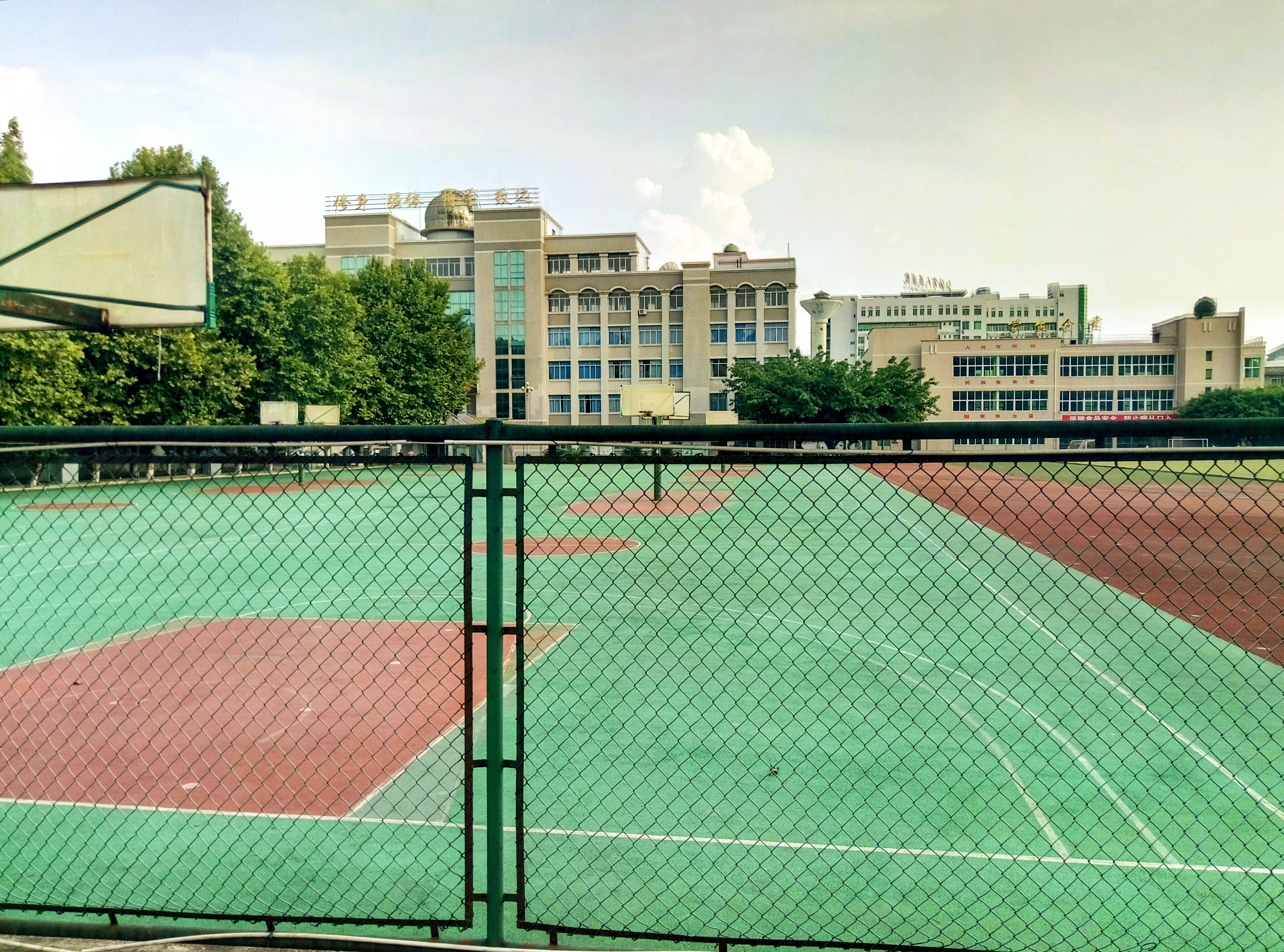 在2017/8/4由魅蓝3S拍摄，使用了HDR模式且运用了Adobe Lightroom的iPad版应用程序调整色彩。